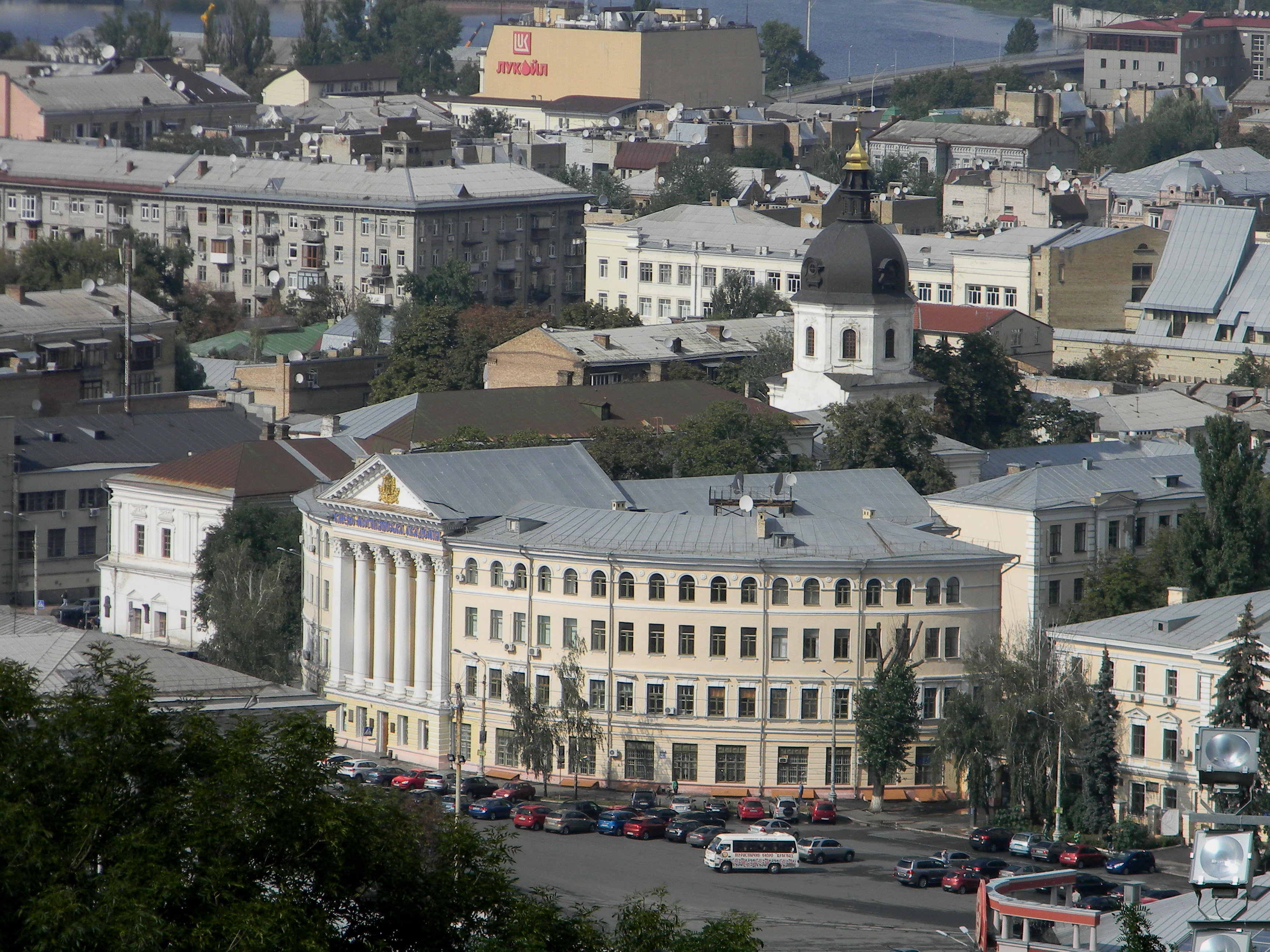 Будинок з крамницями, в якому у 1941 р. містився штаб Дніпровської військової флотилії, Київ, Контрактова пл., 3